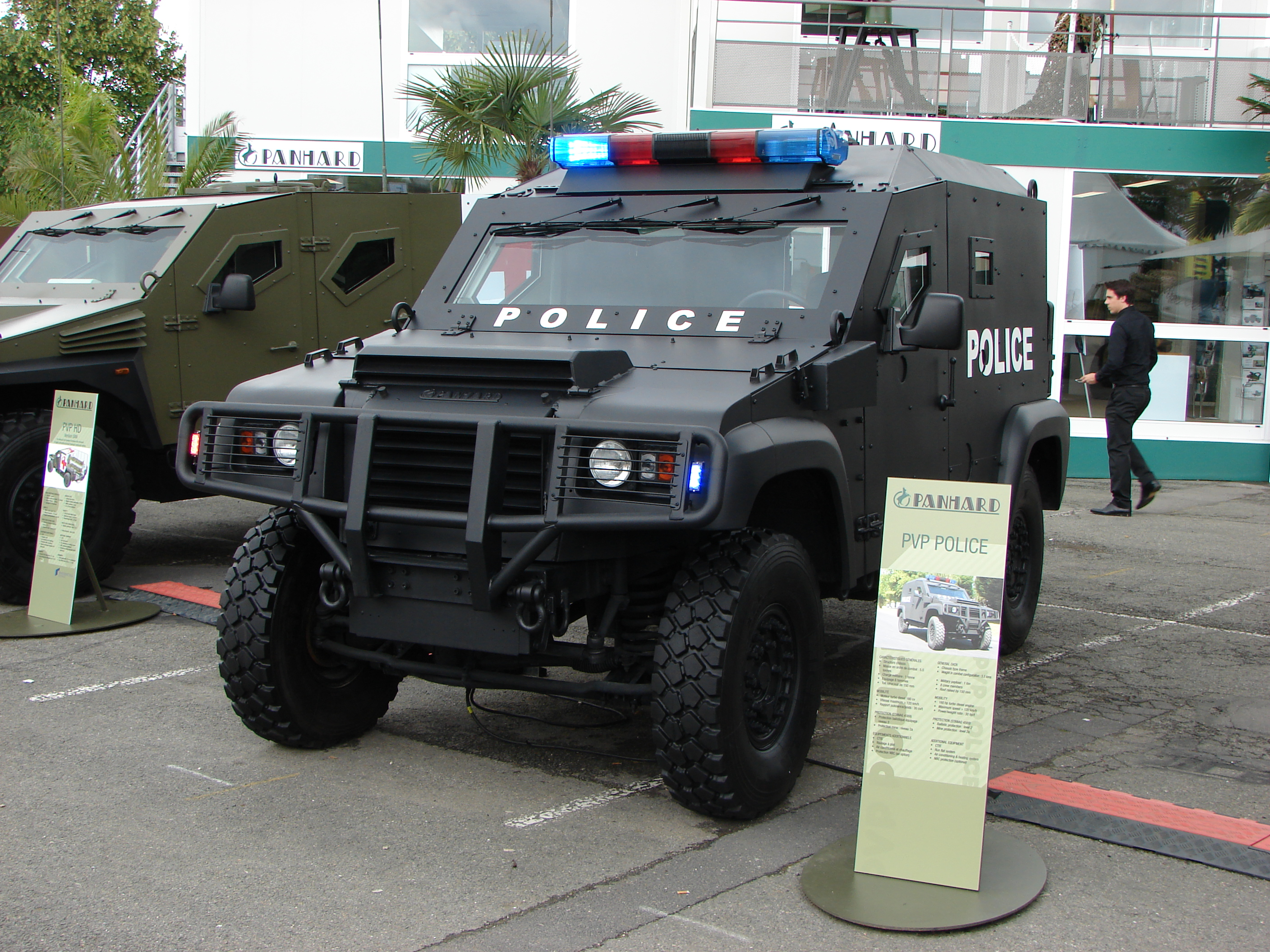 Panhard à Eurosatory 2012